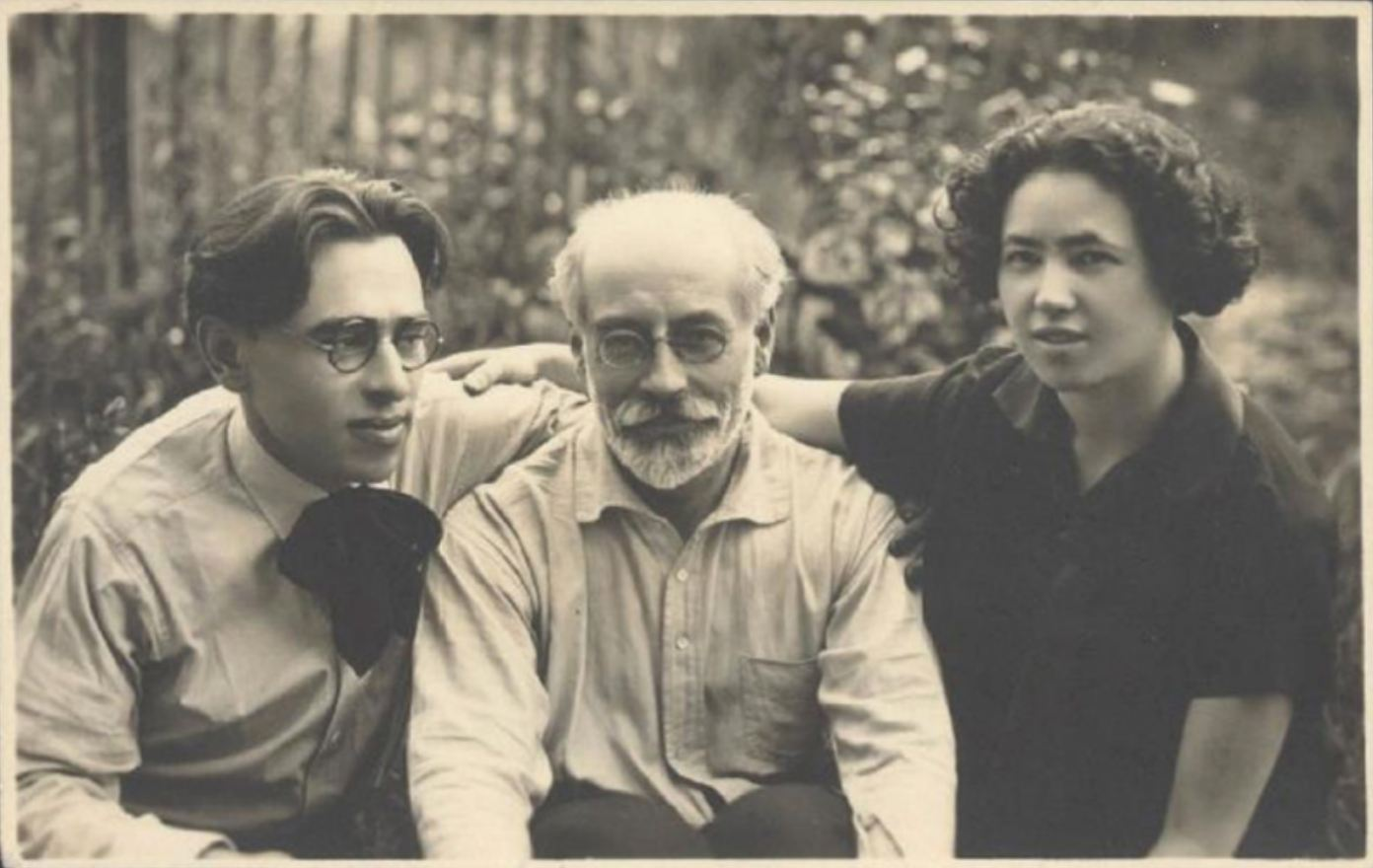 Senya Fleshin - Voline - Mollie Steimer (sans doute à Berlin au début des années 1920)